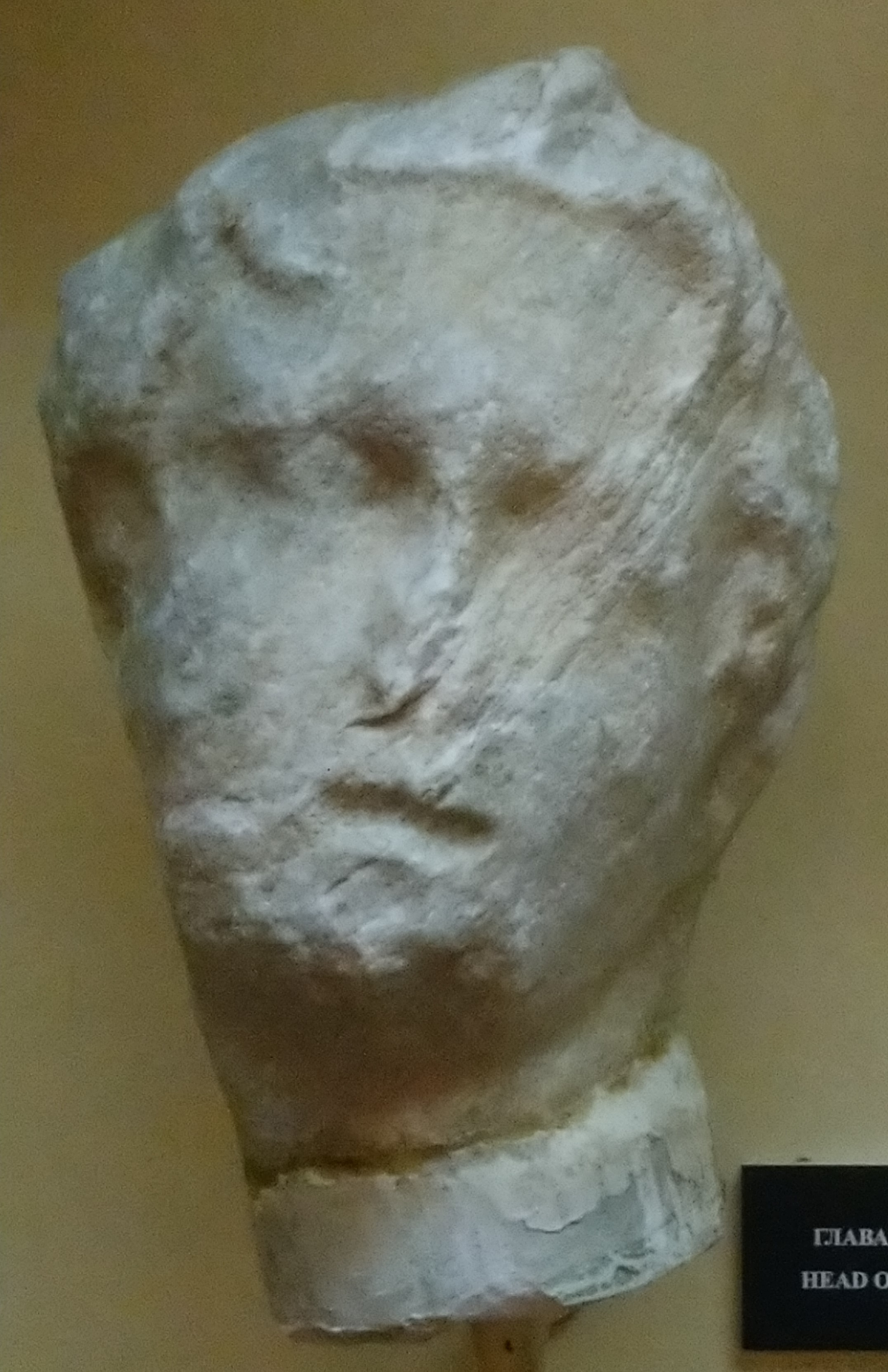 Исторически музей Пазарджик - Глава на вакханка - Блатница